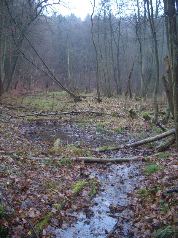 Feuchte Senke im Osten des Naturschutzgebiets Maibachtal in Mecklenburg-Vorpommern.